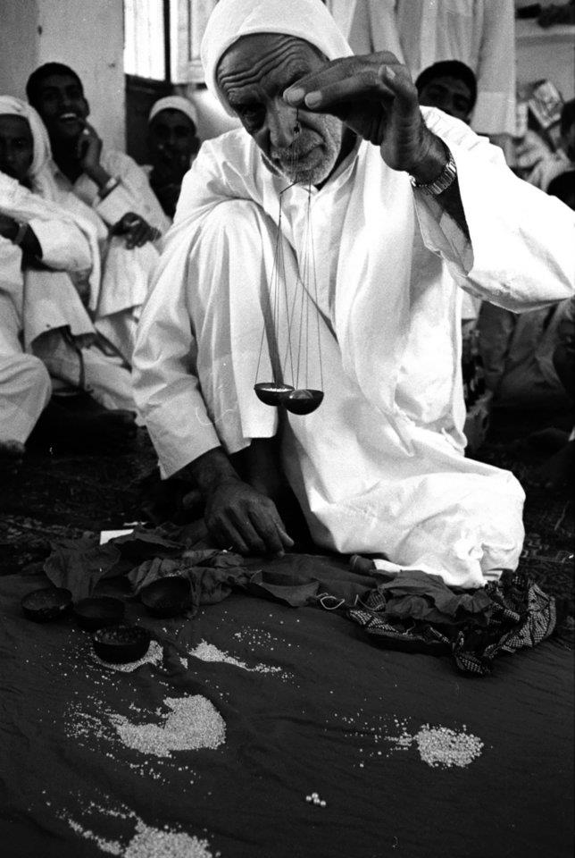 صورة للطواش علي الحبيب